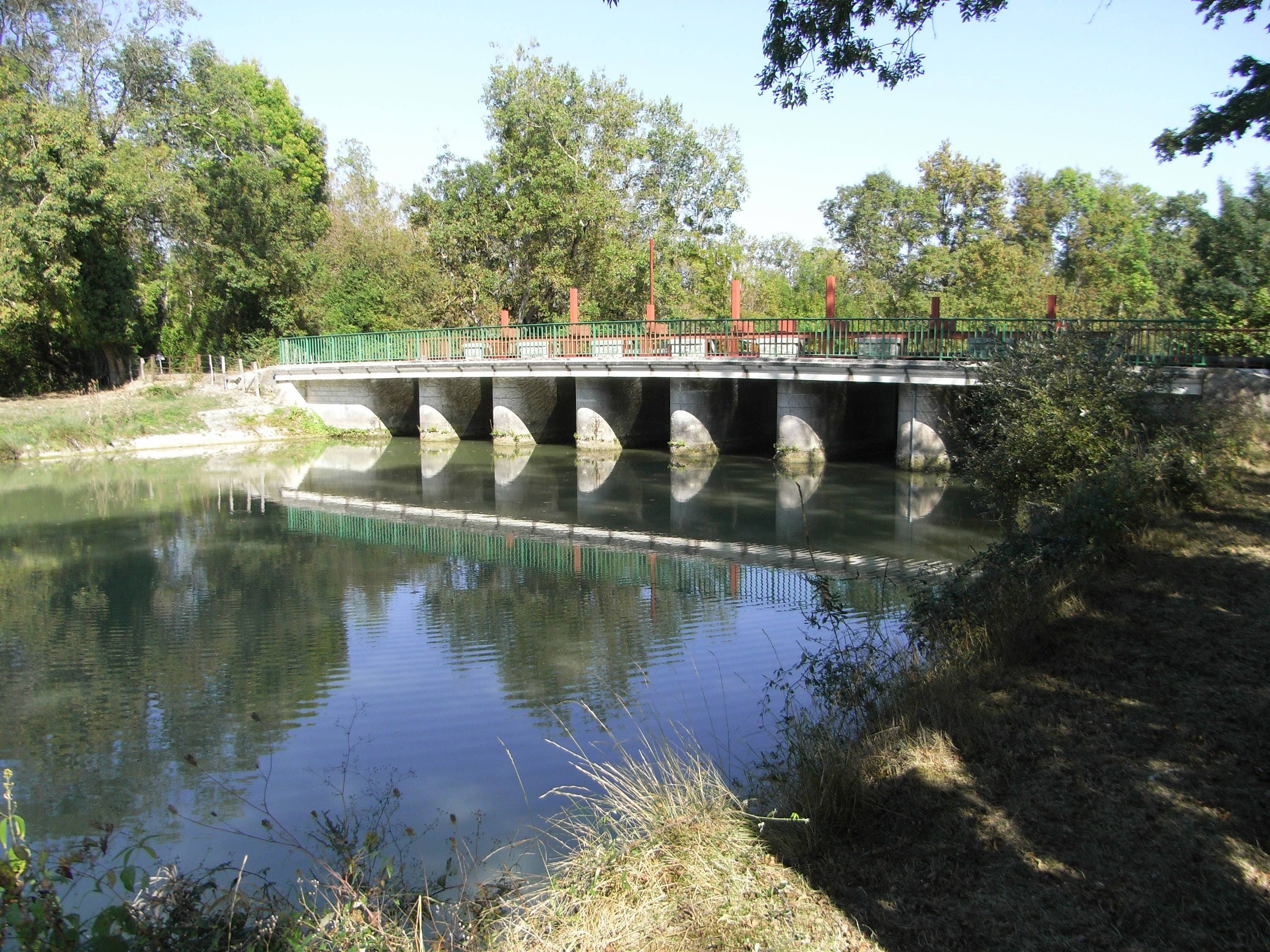 Pont sur la Boutonne (près de l'écluse de Bel-État) avec vannes en (Charente-Maritime - France).